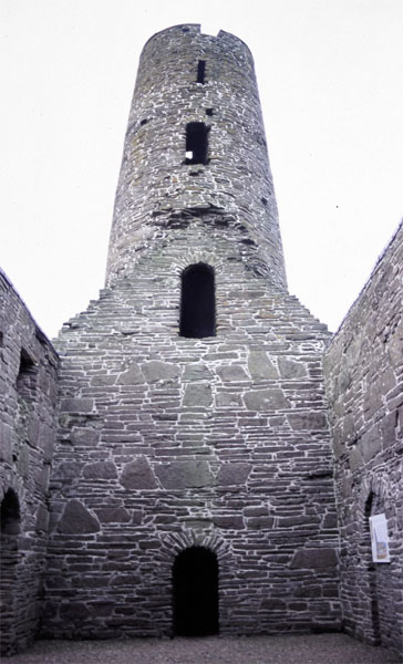 St. Magnus Church, Egilsay - interior